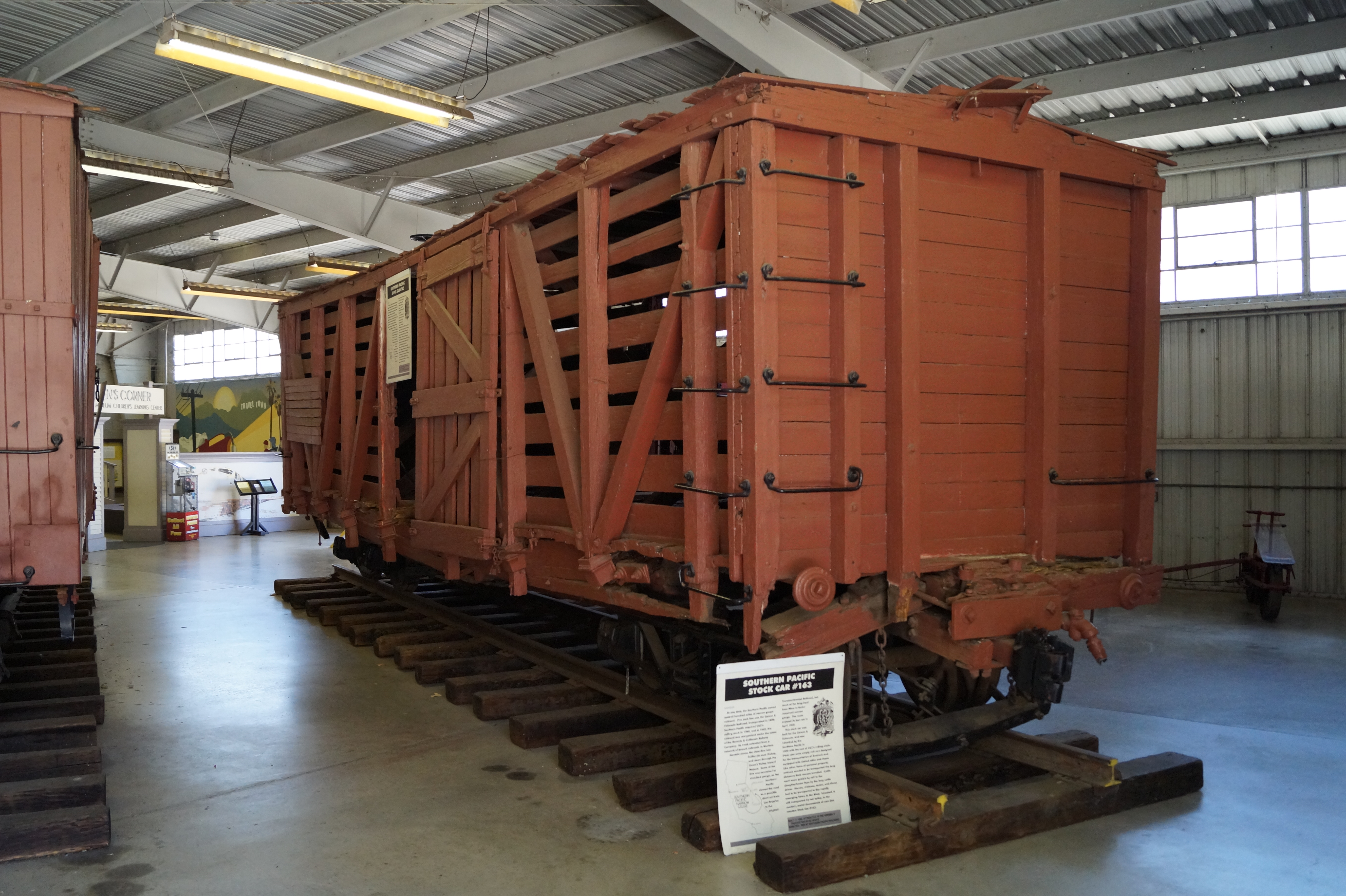 Travel Town Museum is a transport museum dedicated in the northwest corner of Los Angeles, California's Griffith Park. The history of railroad transportation in the western United States from 1880 to the 1930s is the primary focus of the museum's collection, with an emphasis on railroading in Southern California and the Los Angeles area.